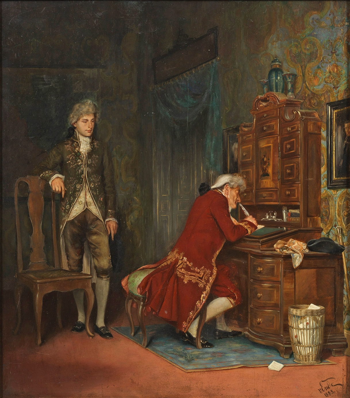 Höfisches Barock-Interieur mit einem Jüngling und schreibendem Herrn; Öl auf Mahagoniholz, rechts unten signiert und datiert 1883. 51 cm x 45,3 cm